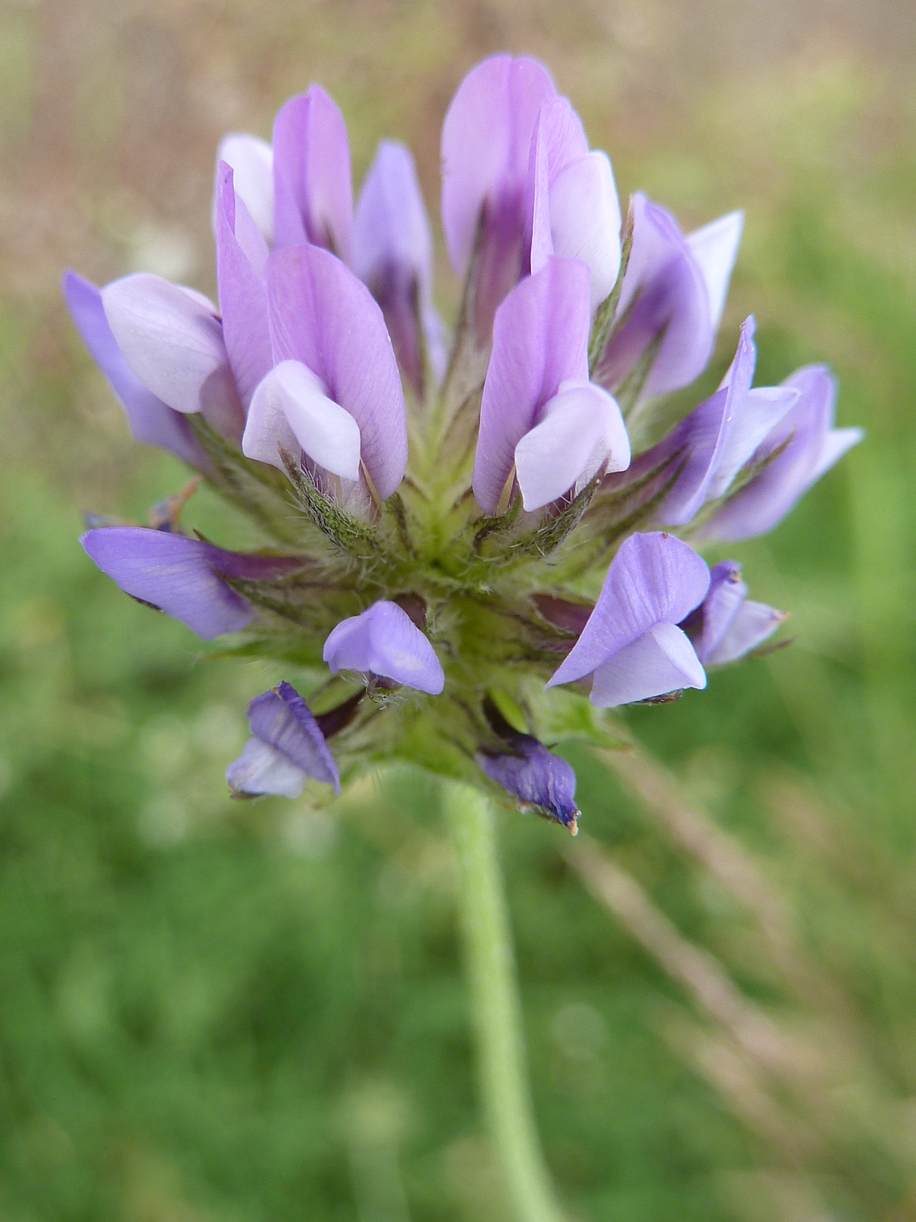 Bituminaria bituminosa - Trebol hediondo : Inflorescencia, vista lateral - Colonia Ilicitana, Albatera (Alicante, España).